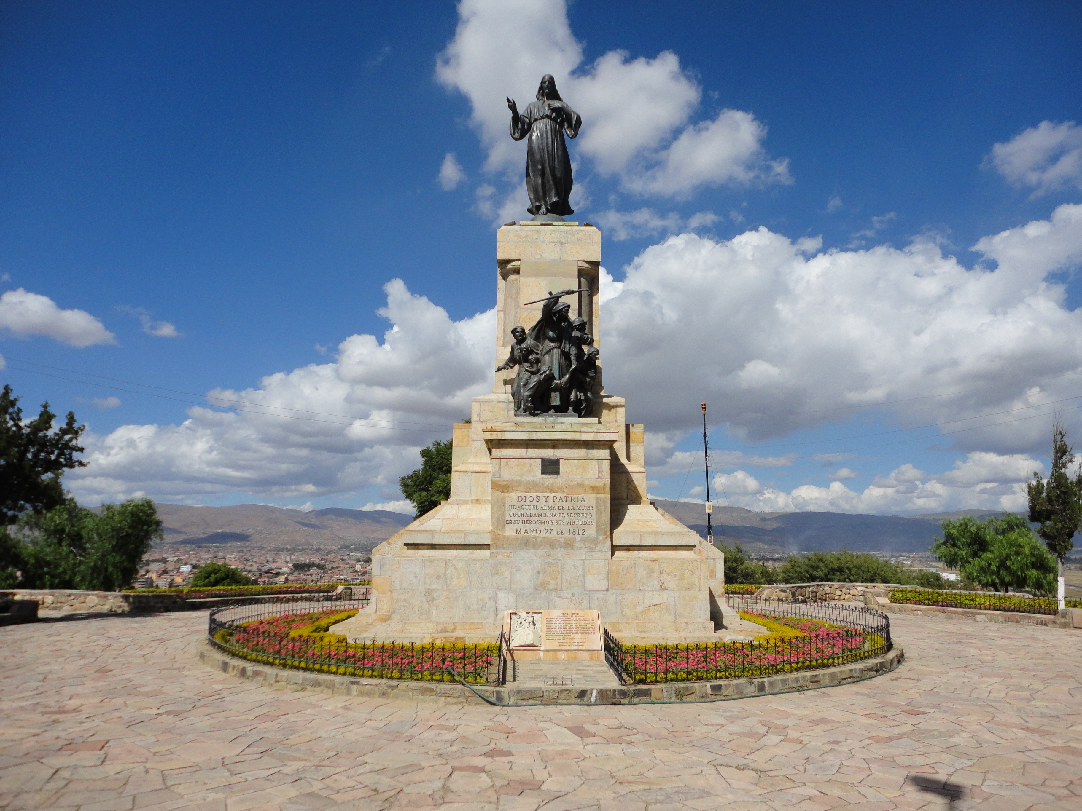 Heroínas de la Coronilla, Cochabamba, Bolivia This medium shows the protected monument with the number C/00-350 in Bolivia.